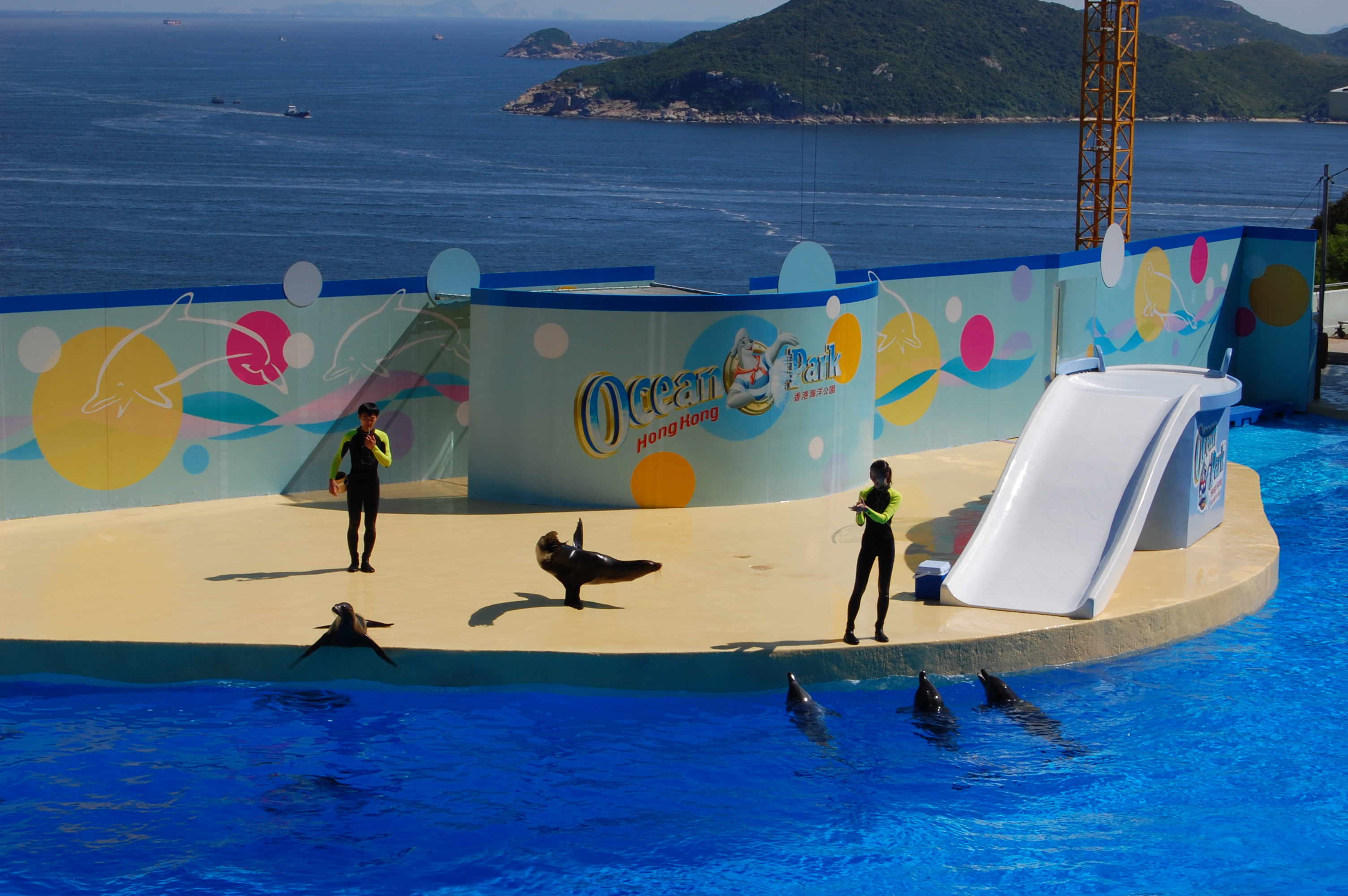 粵語: 香港海洋公園海豚表演